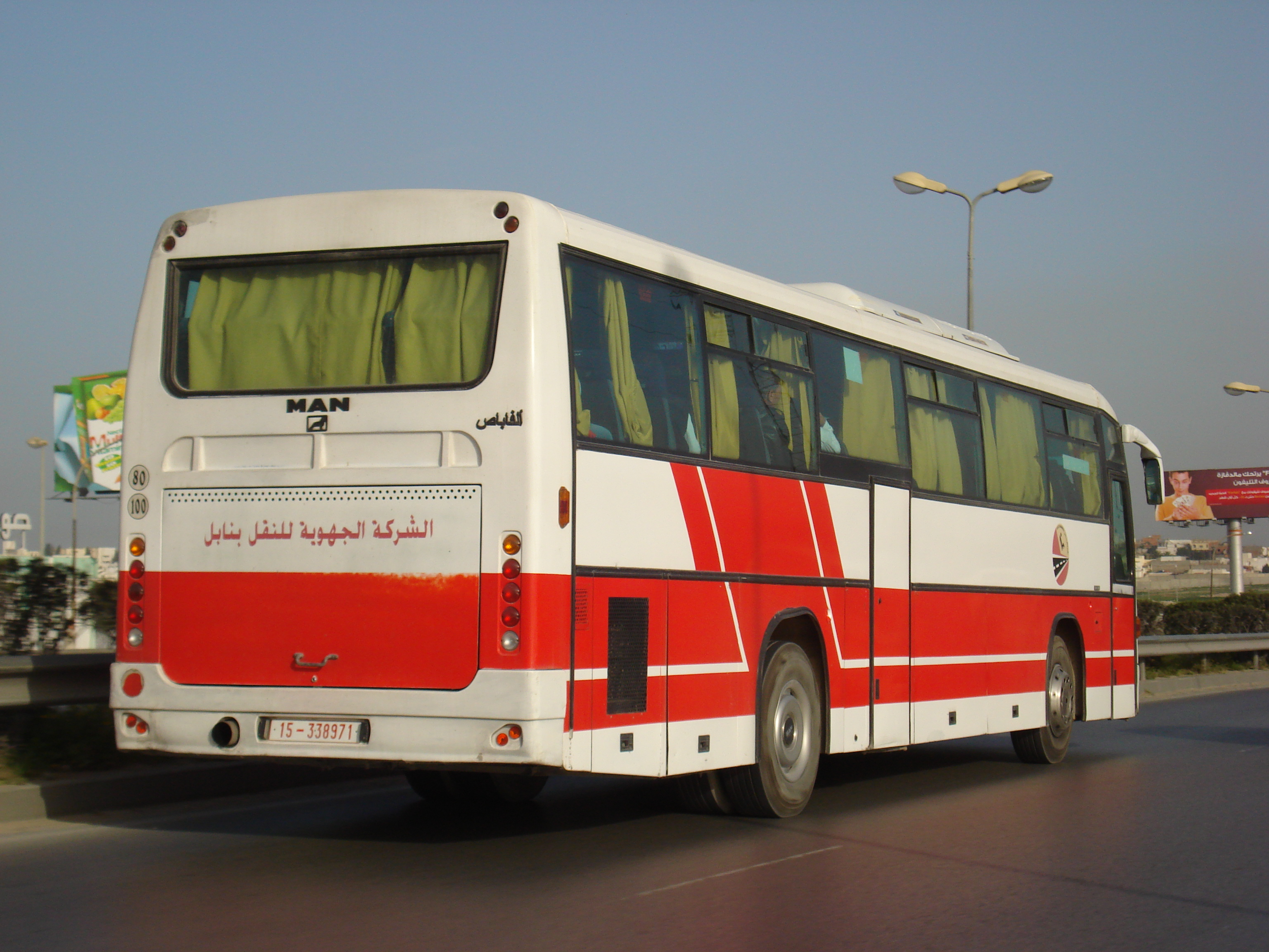 Bus SRTG Nabeul sur la route régionale n°22, Tunis, Tunisie